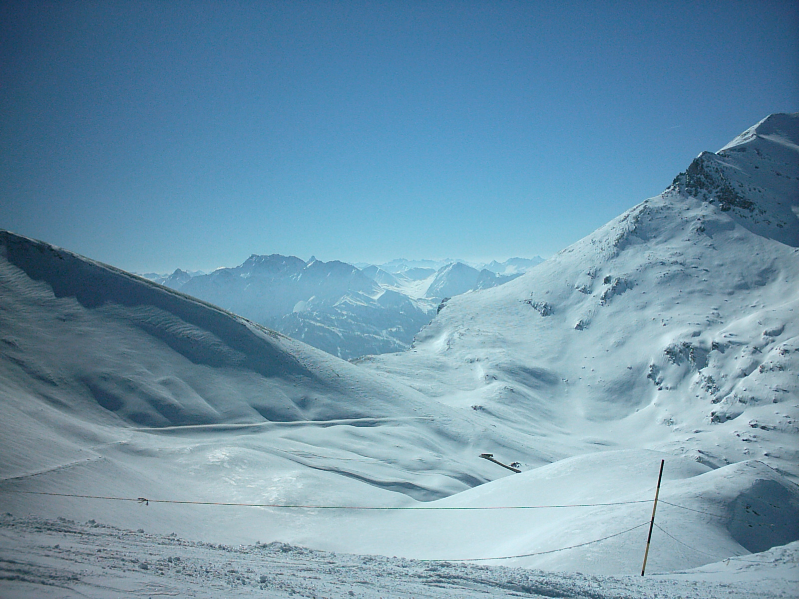 Le Col du Féjus en février, au loin l'Italie Auteur : Vendenesse